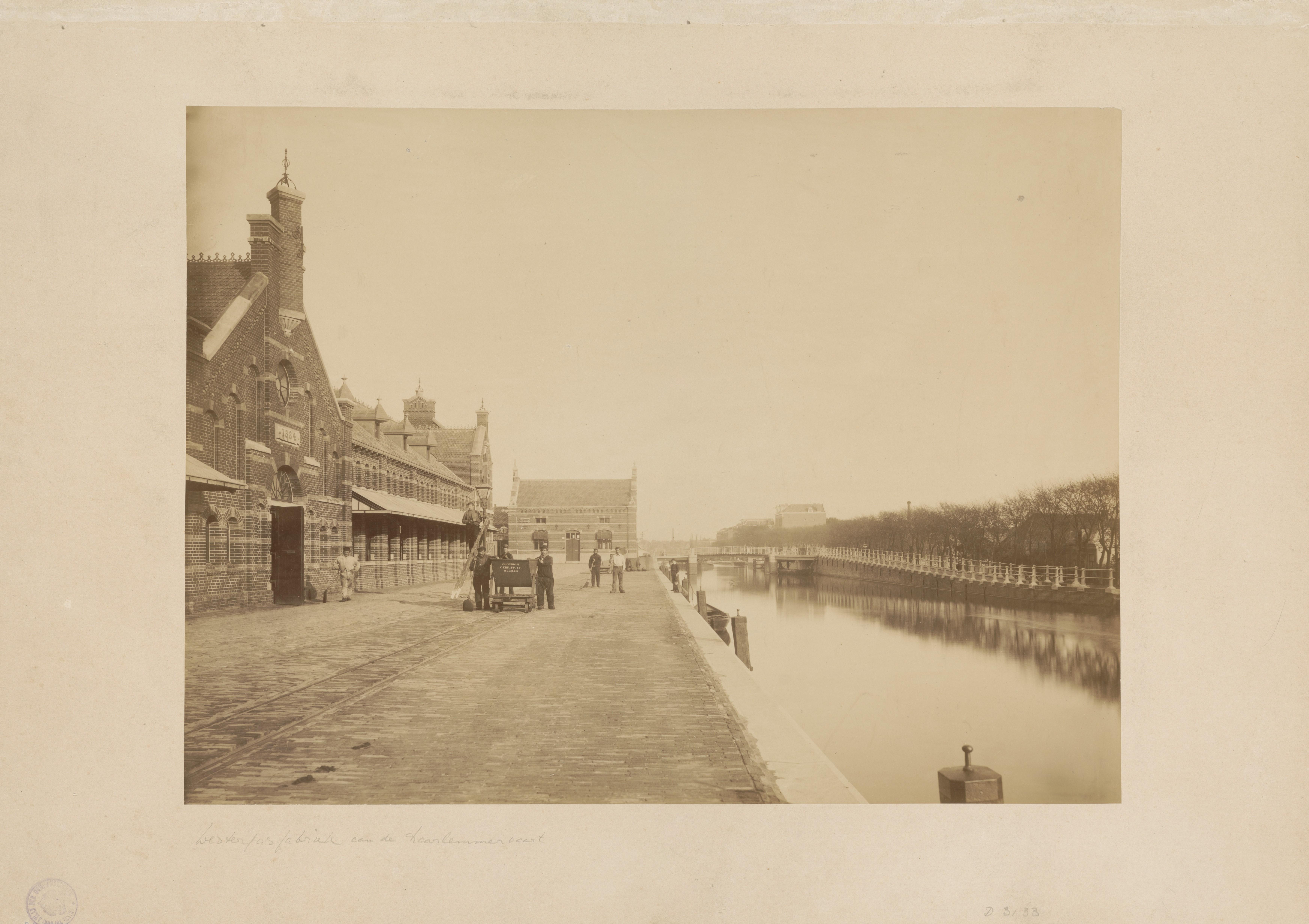 Beschrijving Het terrein van de Westergasfabriek van de Imperial Continental Gas-Association, Haarlemmerweg 4-10, kort na de voltooiing in 1885 Gezien in oostelijke richting met links zuiveringshuis no. II en het regulateurshuis en rechts de Haarlemmervaart en de Haarlemmerweg. Tevens is de zien de voorloper van brug 193, Westergasbrug Documenttype foto Vervaardiger Oosterhuis, Gustaaf (1858-1938) Collectie Collectie Stadsarchief Amsterdam: foto-afdrukken Datering 1885 ca. Geografische naam Haarlemmervaart Haarlemmerweg Inventarissen Afbeeldingsbestand ANWK00352000001 Generated with Dememorixer